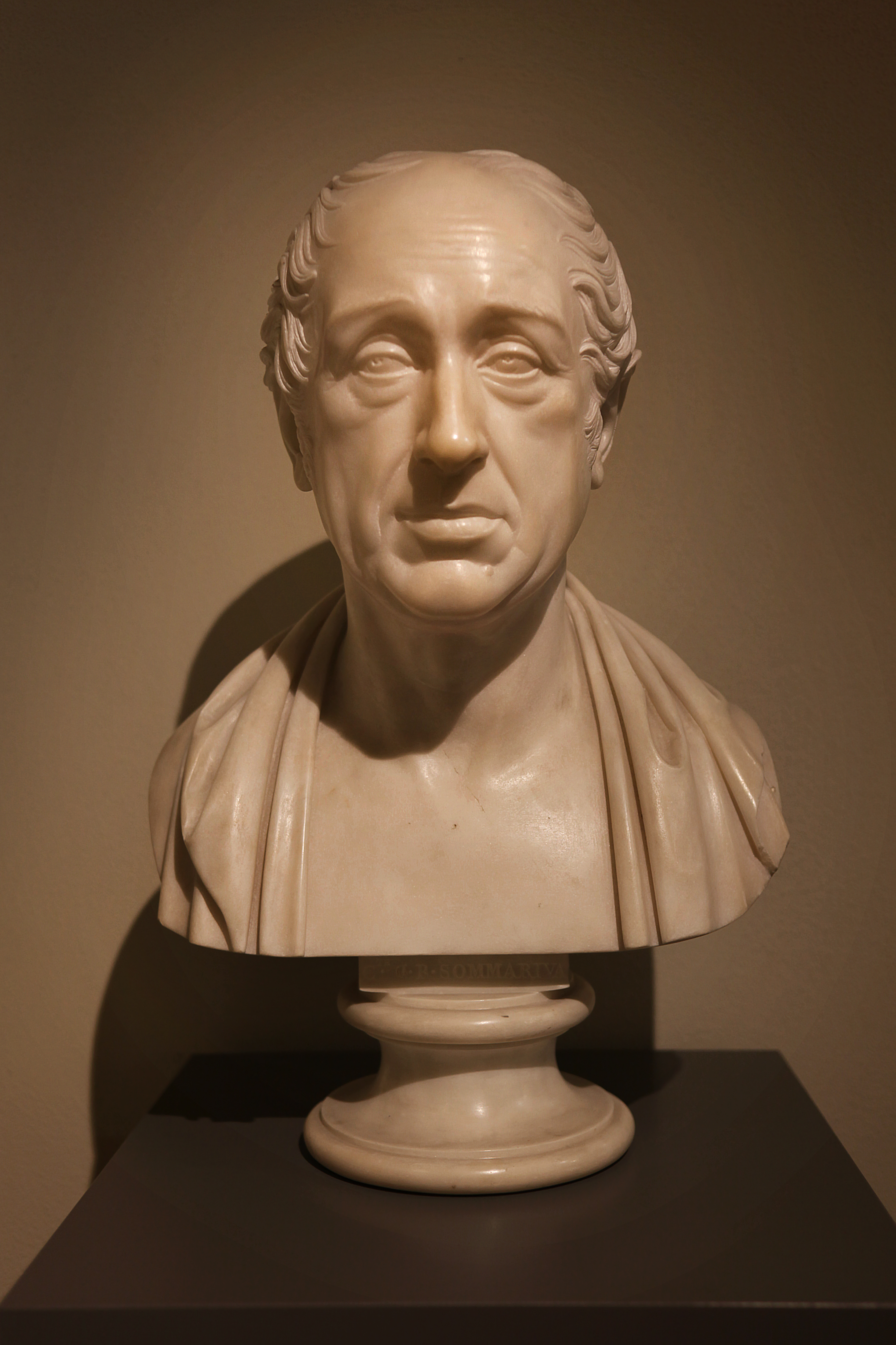 Bertel Thorvaldsen (1770-1844) Ritratto di Giovan Battista Sommariva (1821), esposto alla Galleria d'Arte Moderna di Milano